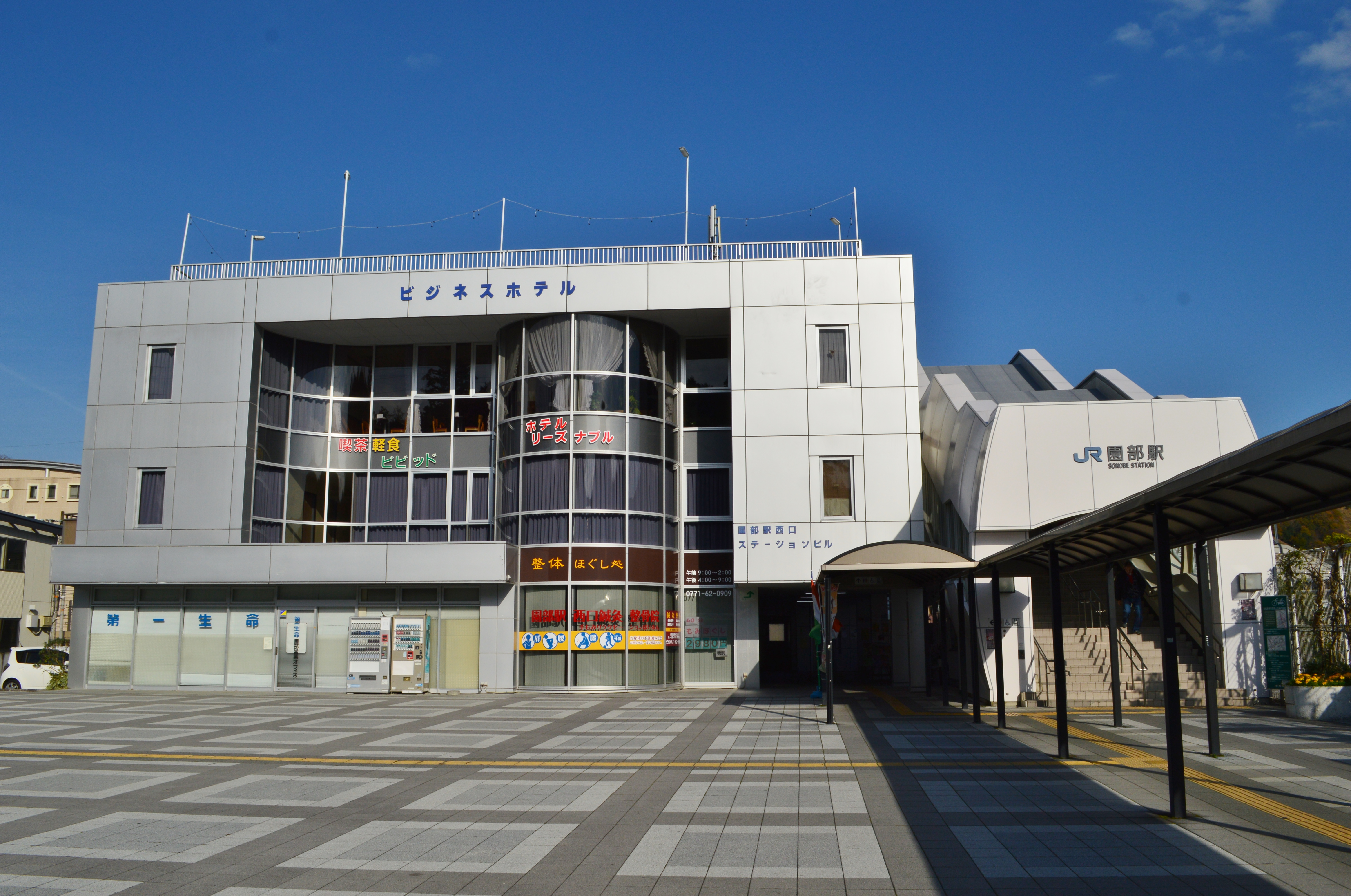 園部駅西口